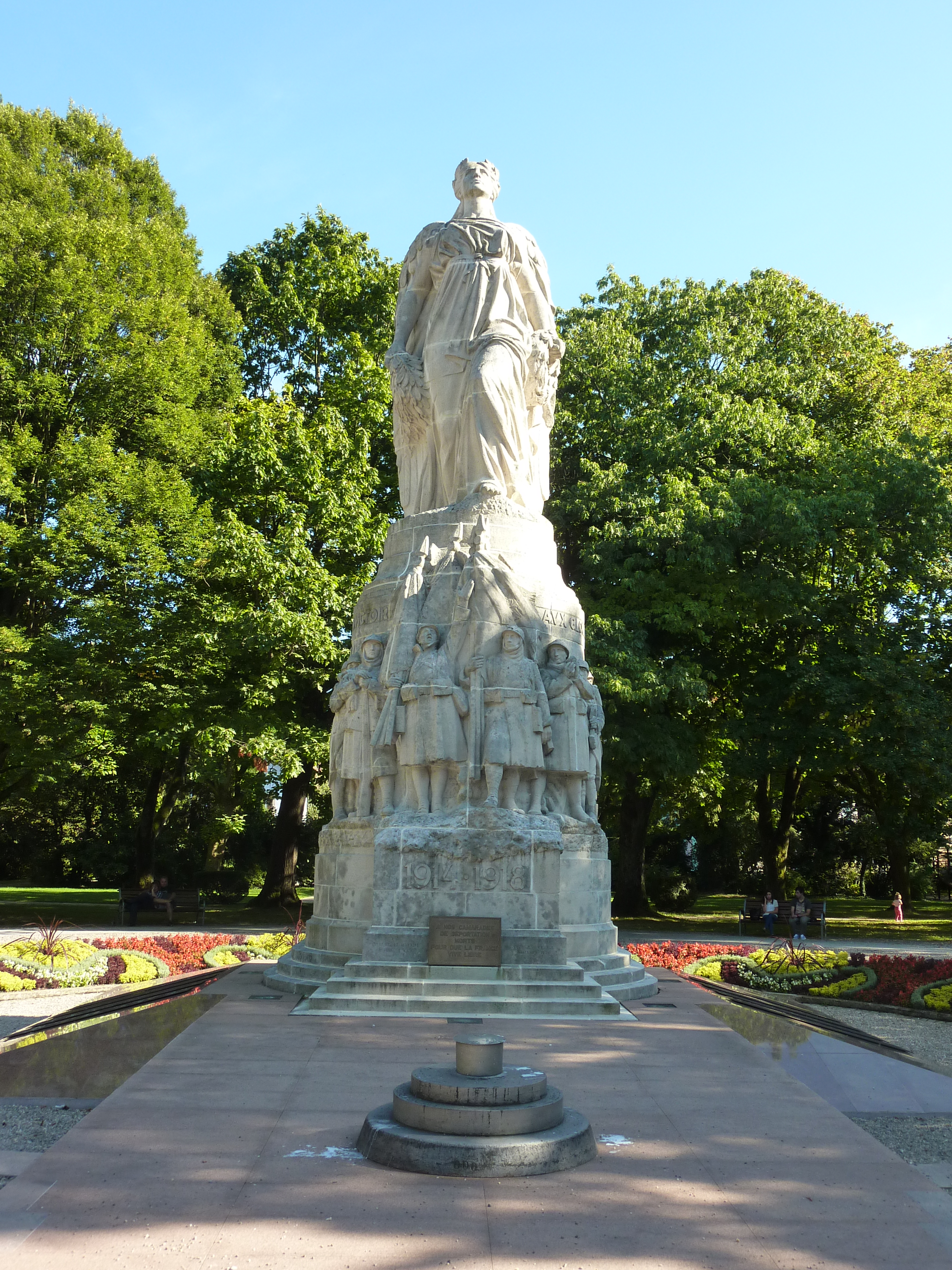 Monument aux morts de Belfort